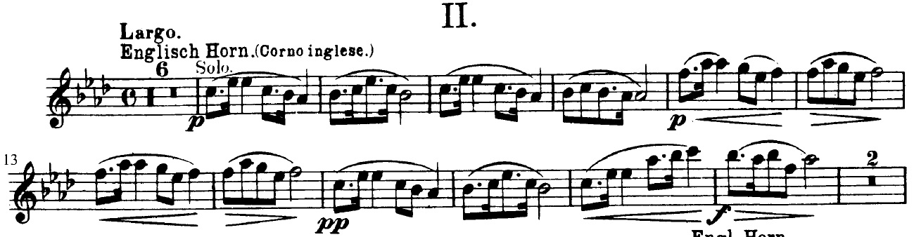 Dvorak, court extrait de la 9e symphonie, 2e mouvement, premières mesures du thème au cor anglais